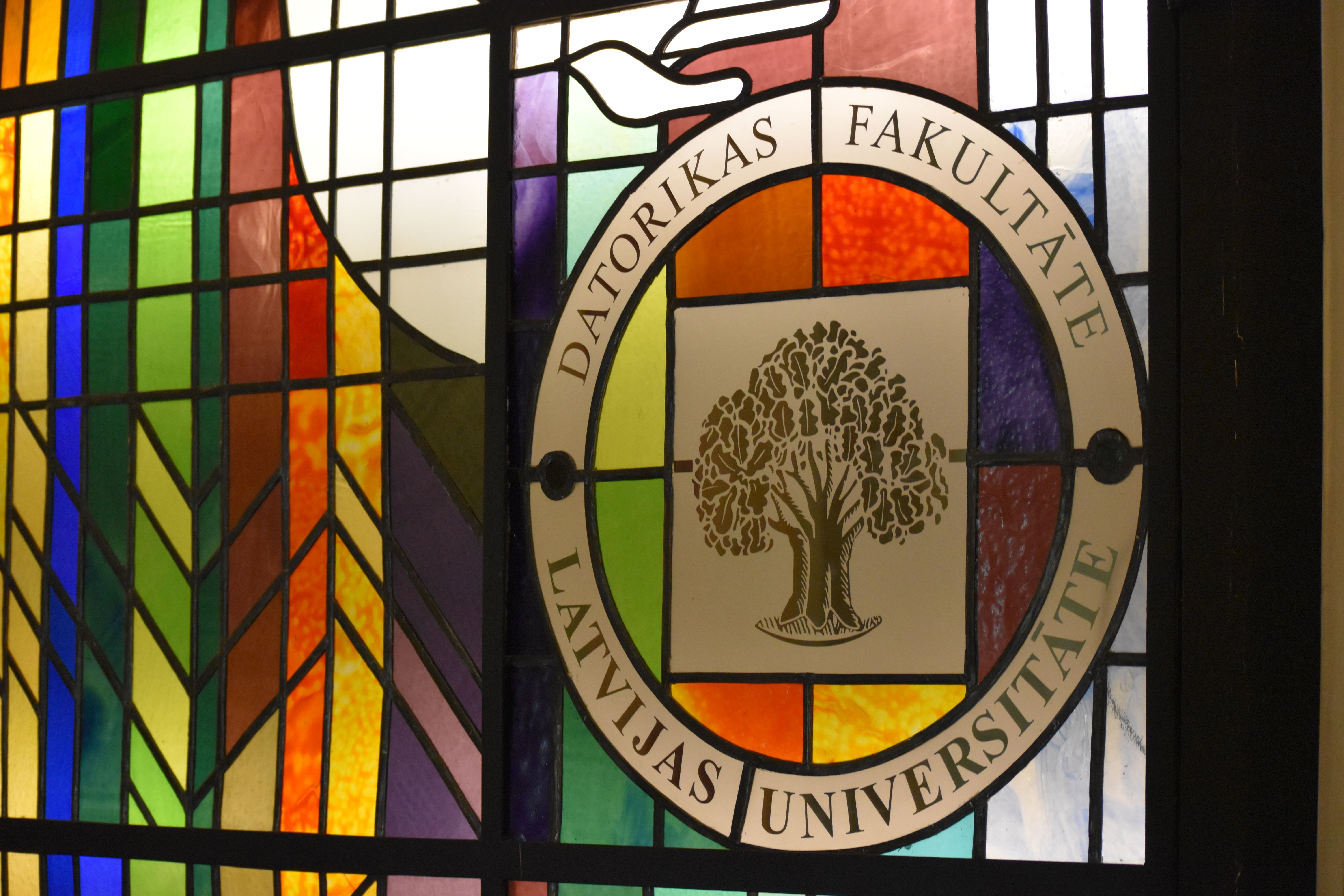 Datorikas fakultātes vitrāža Raiņa bulvārī 19, 3. stāvā